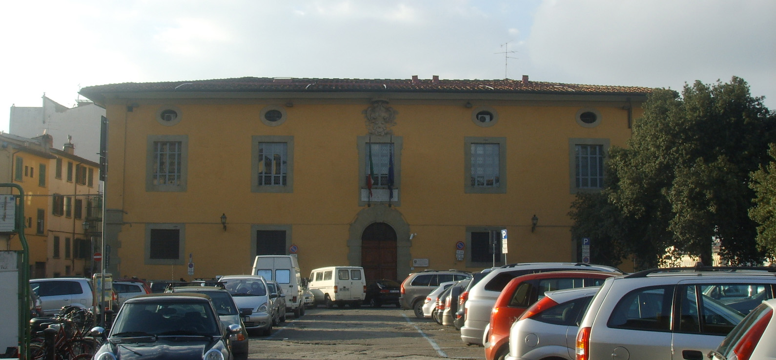 Ex_Granaio_dell'Abbondanza_(piazza_di_cestello)